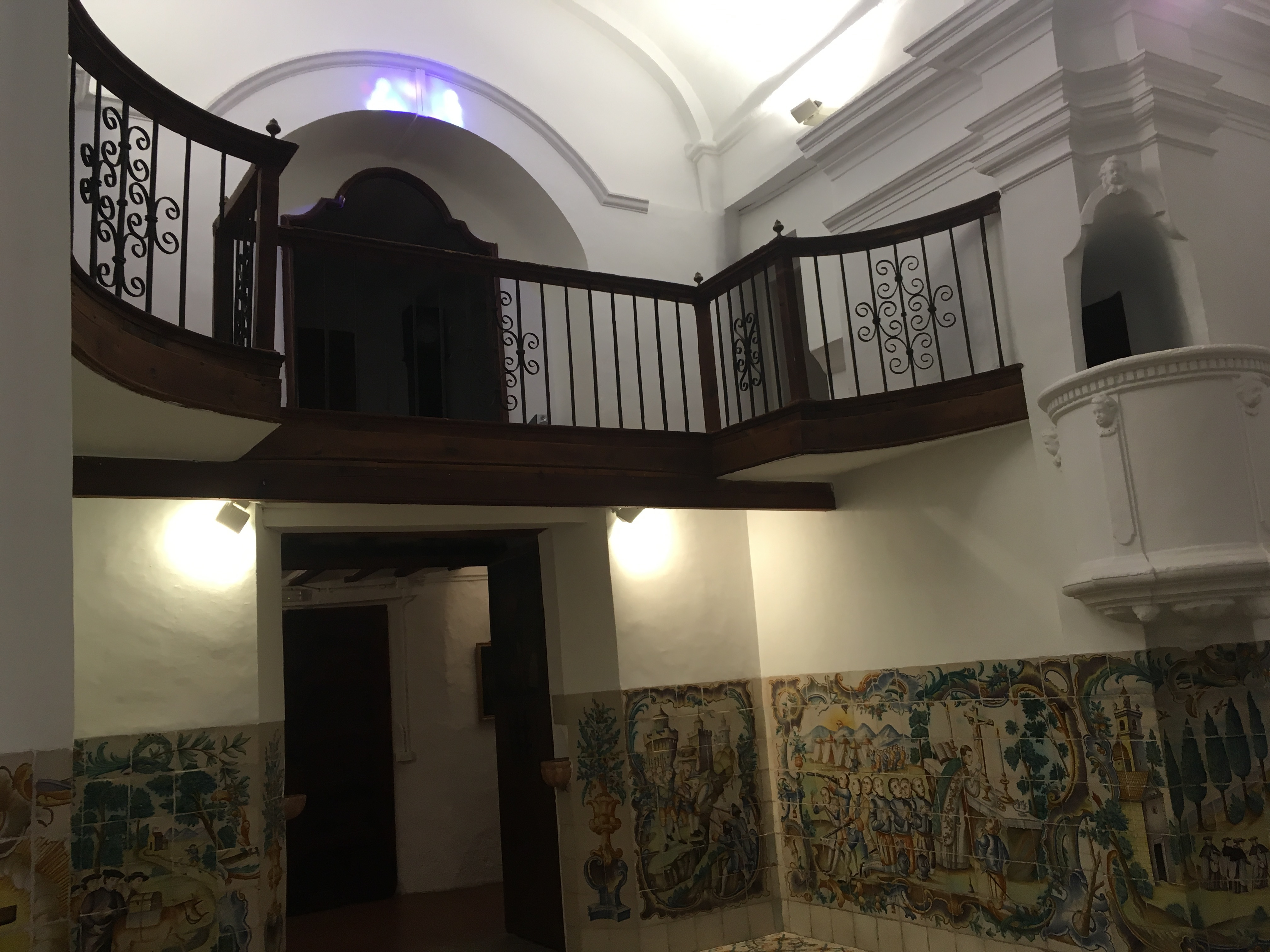 Entrada a l'esglesia de l'ermita